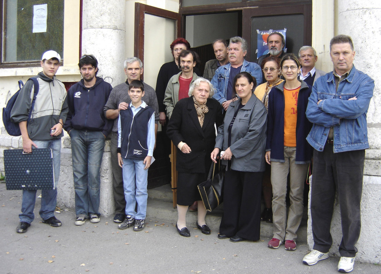 en: Đola 2004., art colony, Darda, 2004. Đola 2004., likovna kolonija, Darda, 2004.